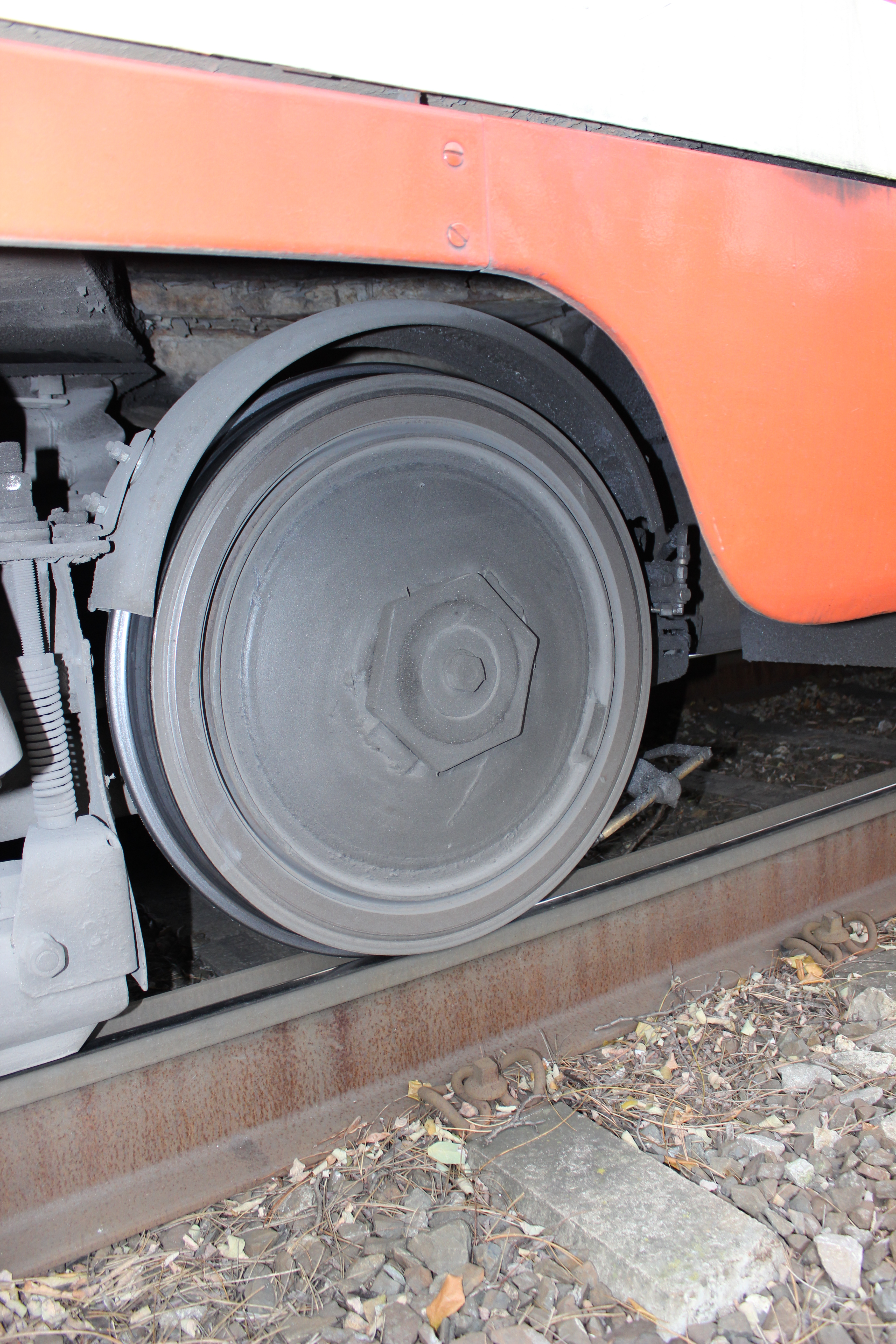 Pracovní tramvaj T3M evidenční číslo 5572. Vyfotografováno laskavostí pracovníků Dopravního podniku hlavního města Prahy – Milana Slunečka, Jiřího Štábla a Martina Brejši.